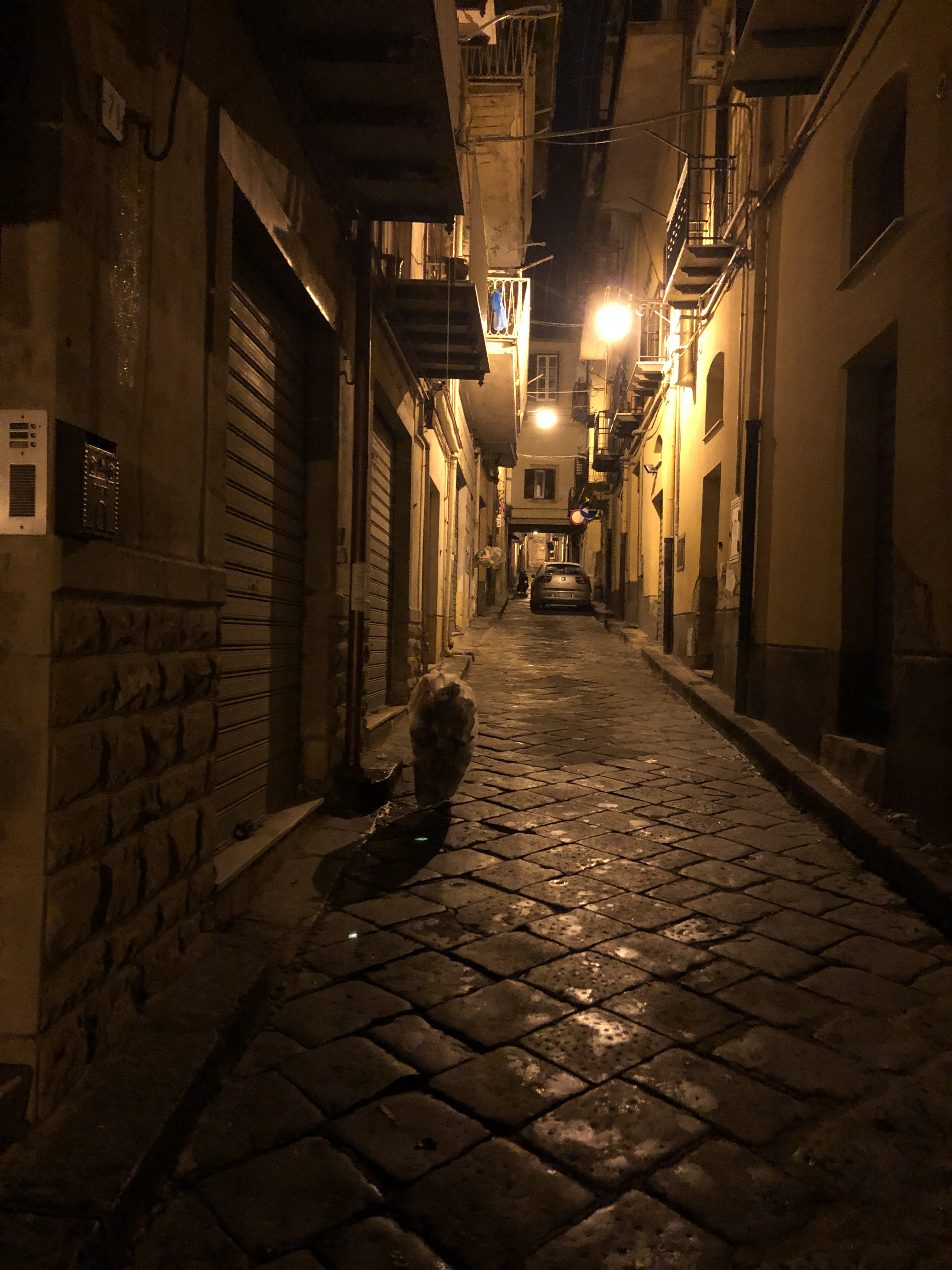 Via Gigino Gattuso a CL vista di sera dalla "strata a foglia" verso corso Umberto I